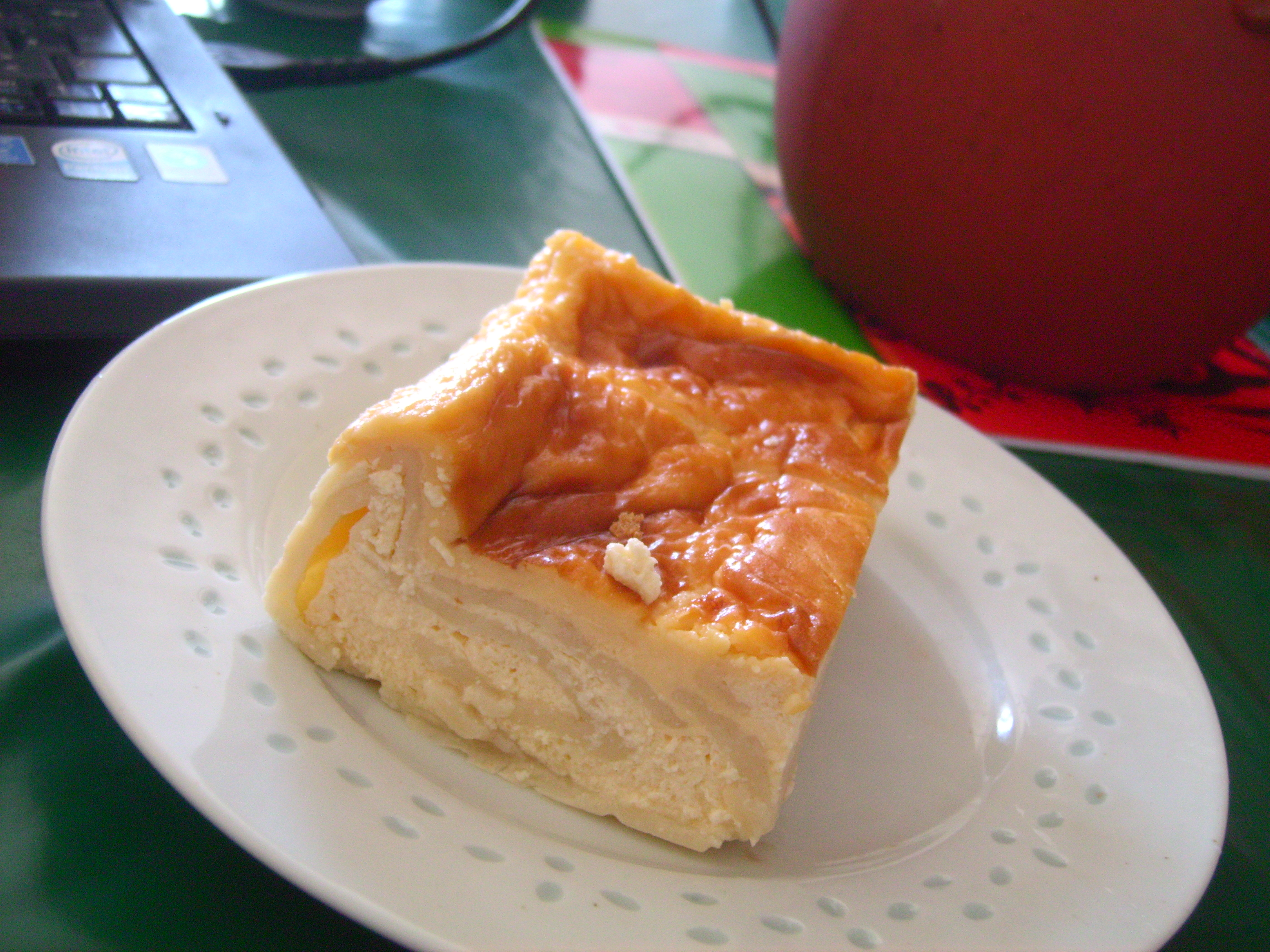 Millirahmstrudel Münchner Art aus der Bäckerei und Konditorei Huber, Aribonenstraße 14, Ramersdorf, München